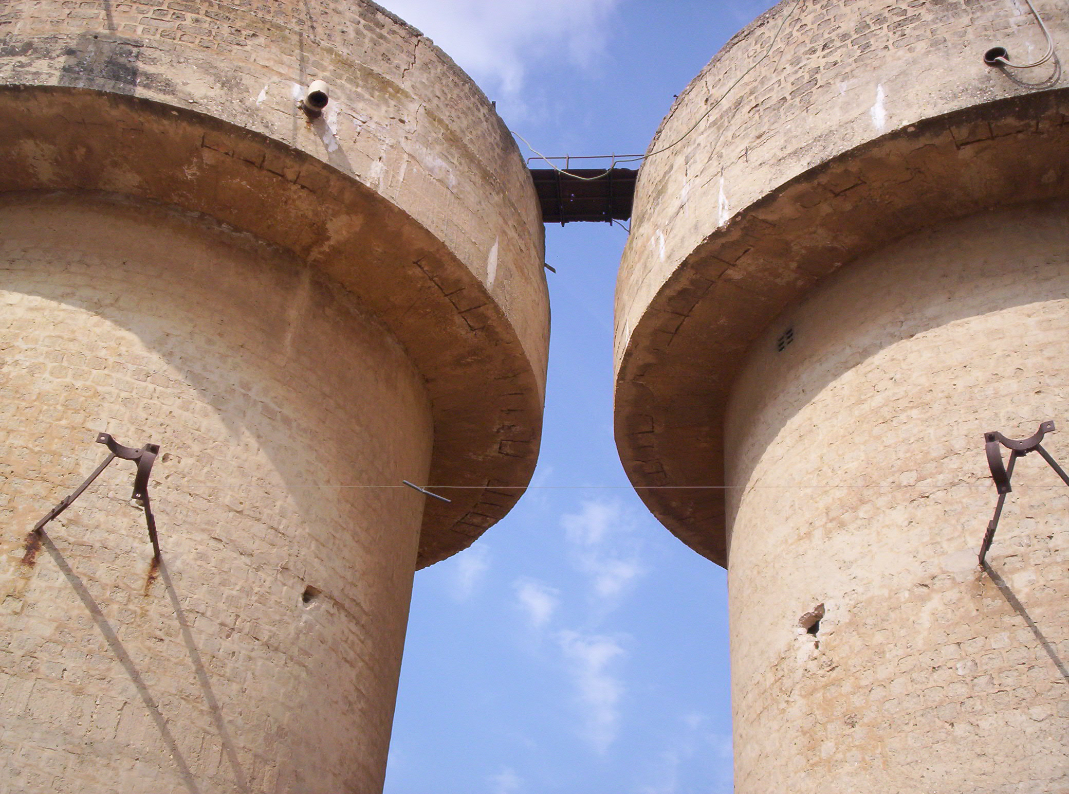 100_5271.jpg